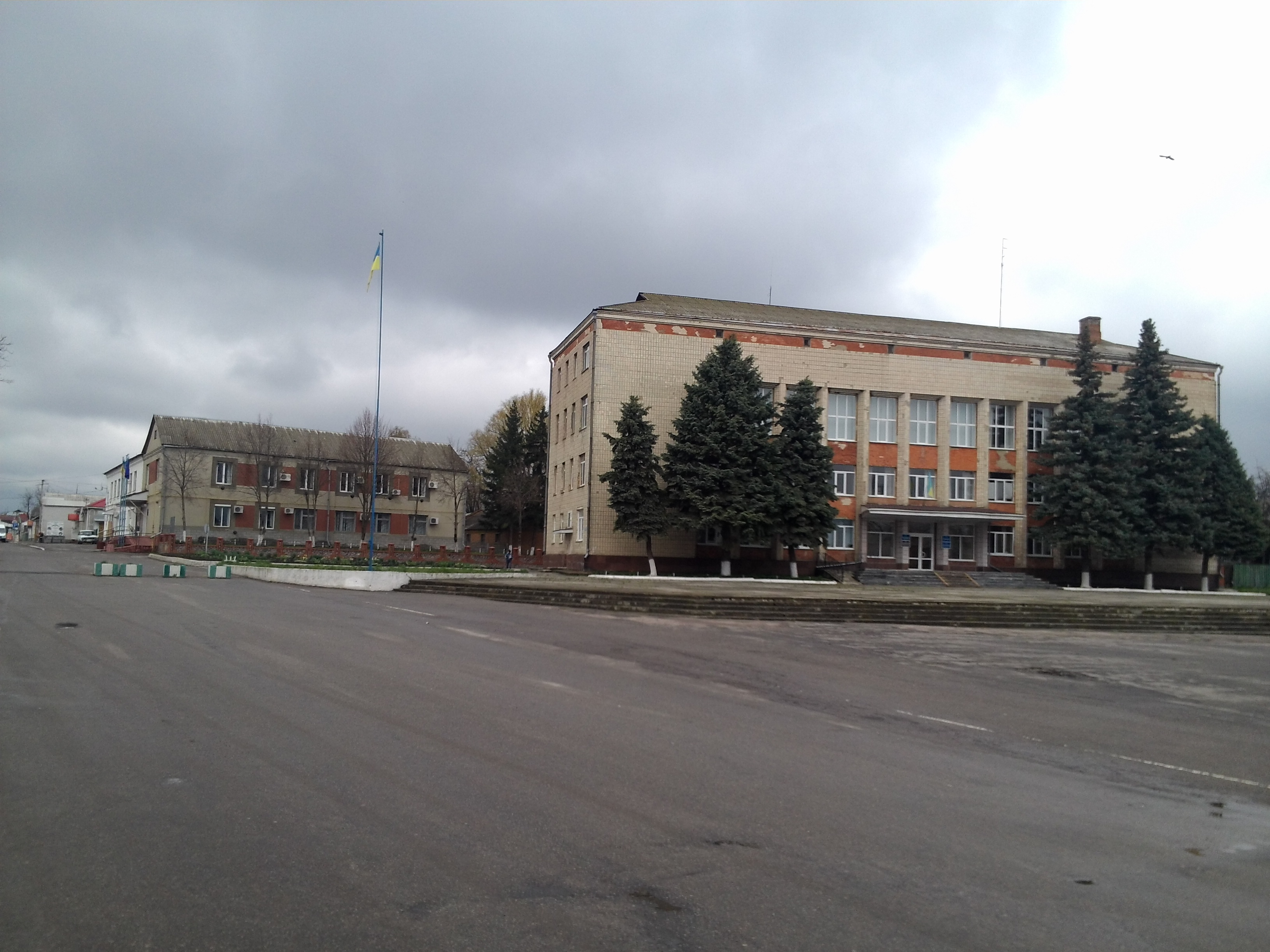 м. Погребище. У центрі міста.